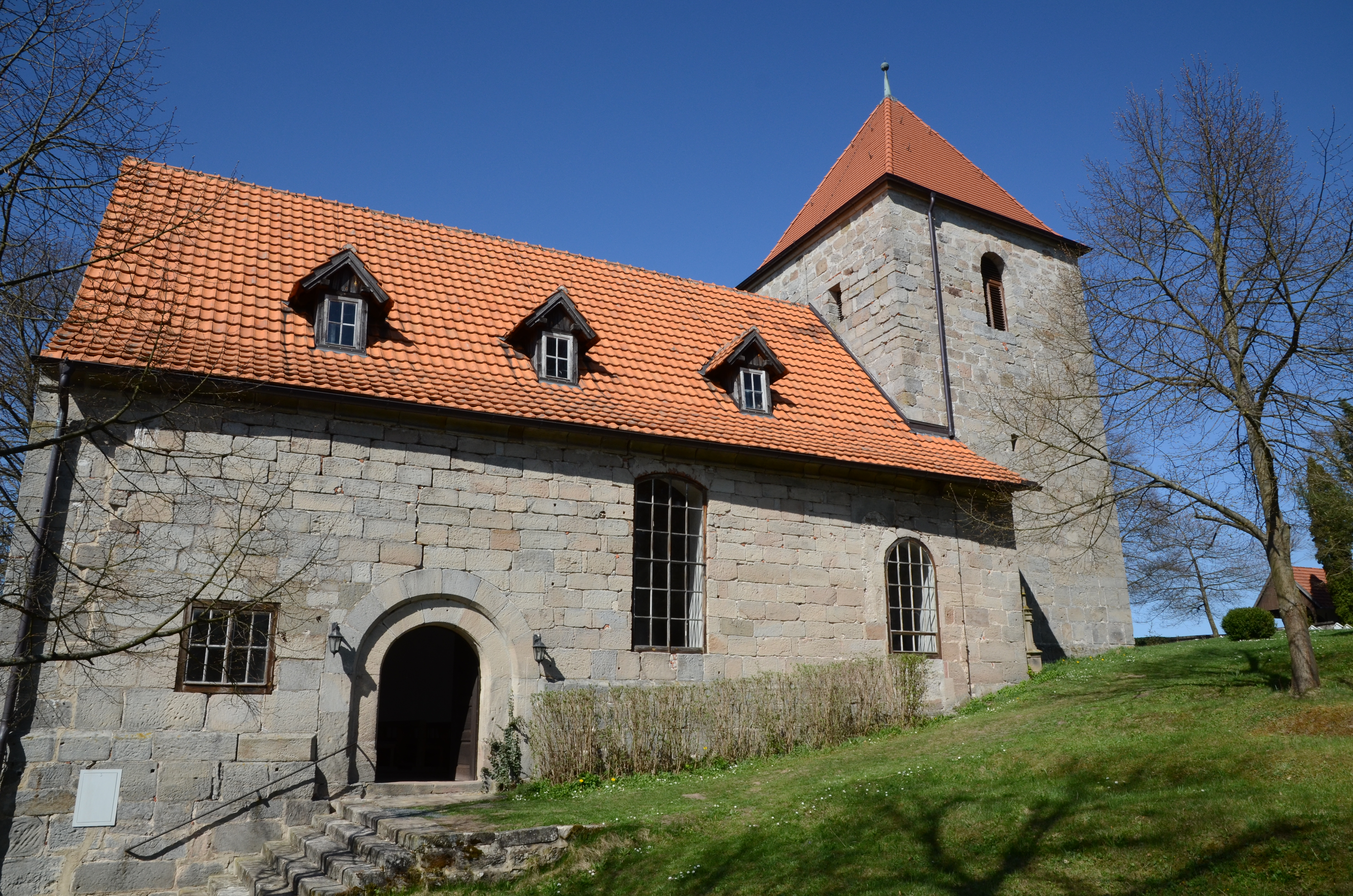 Andreaskirche Ummerstadt 6.-8. Jh.